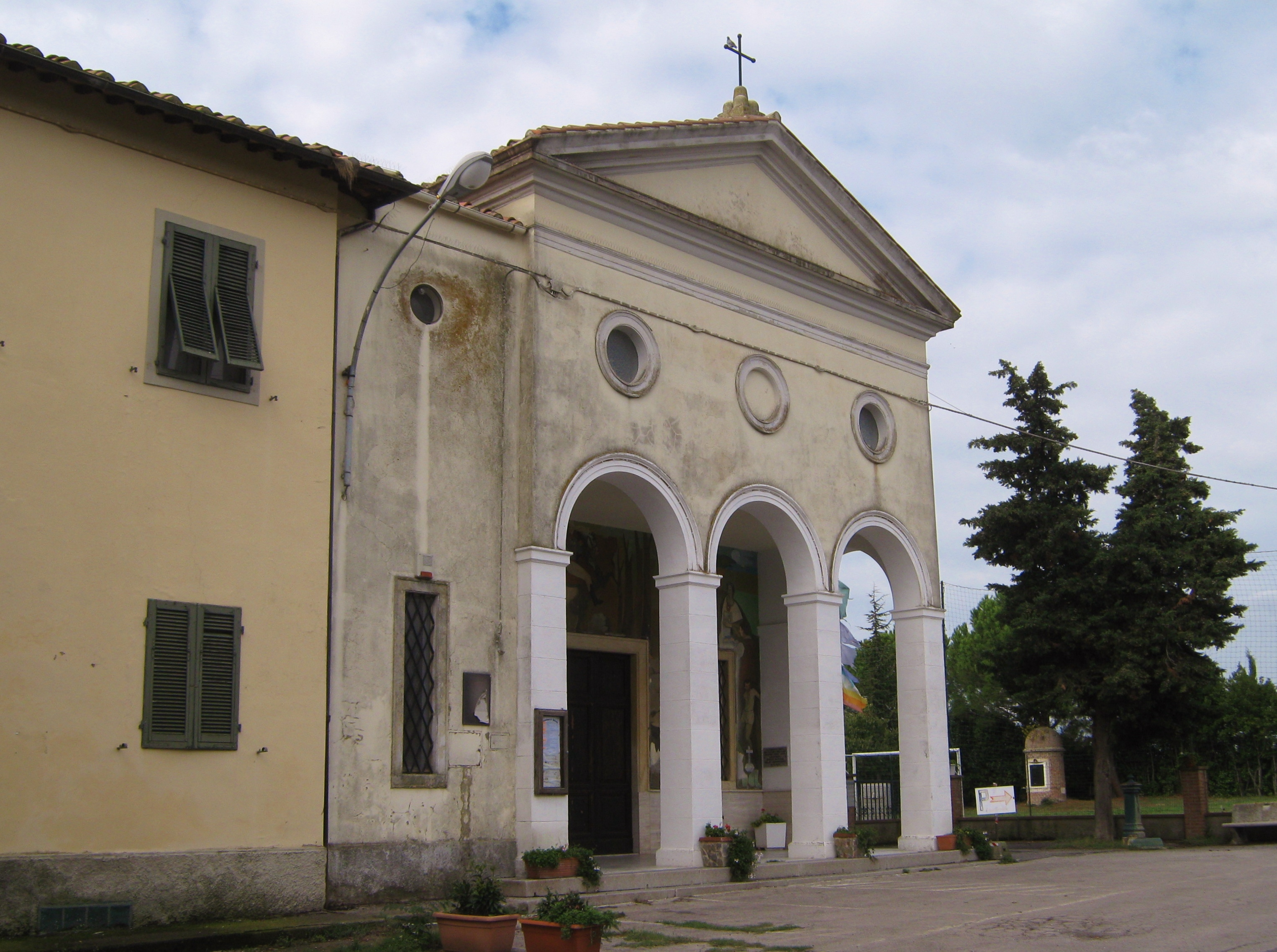 Cecina, località Collemezzano (LI): chiesa di Sant'Antonio.